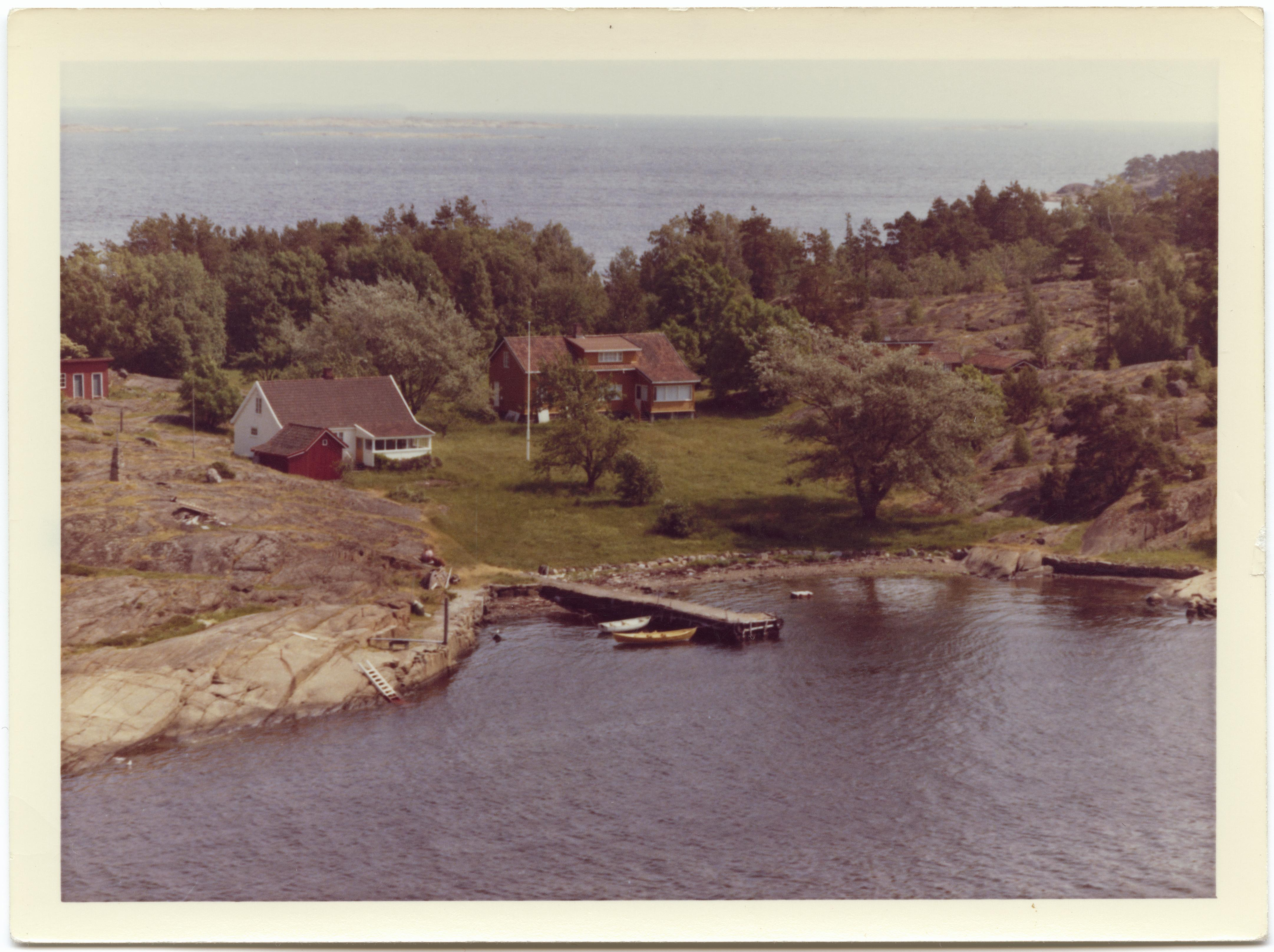 WF.S.166120